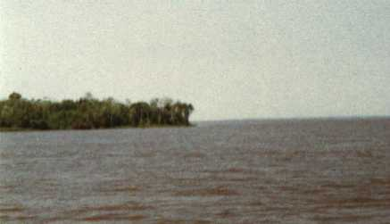 La bildo estas kopiita de de. La originala priskribo estas